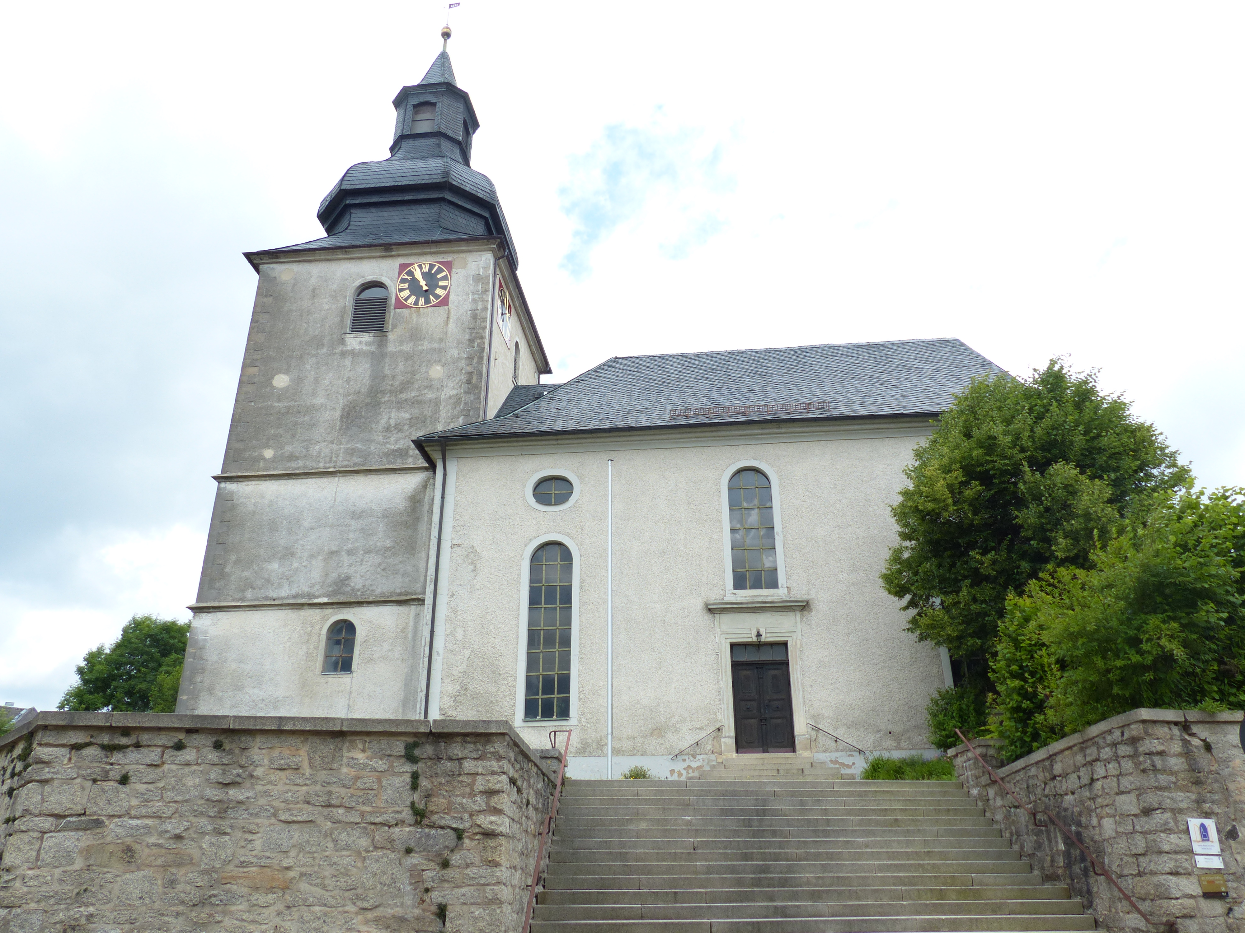 Marienkirche in Stammbach, Ansichten des Außenbereichs